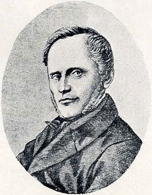 Беларуская (тарашкевіца): Міхал Балінскі